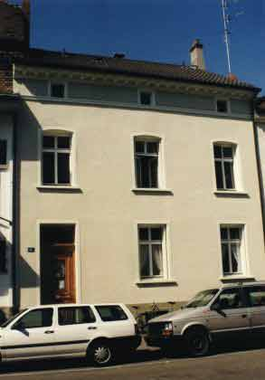 Das Studentenheim Traugott Sandmeyer an der Socinstrasse 6 in Basel, Schweiz